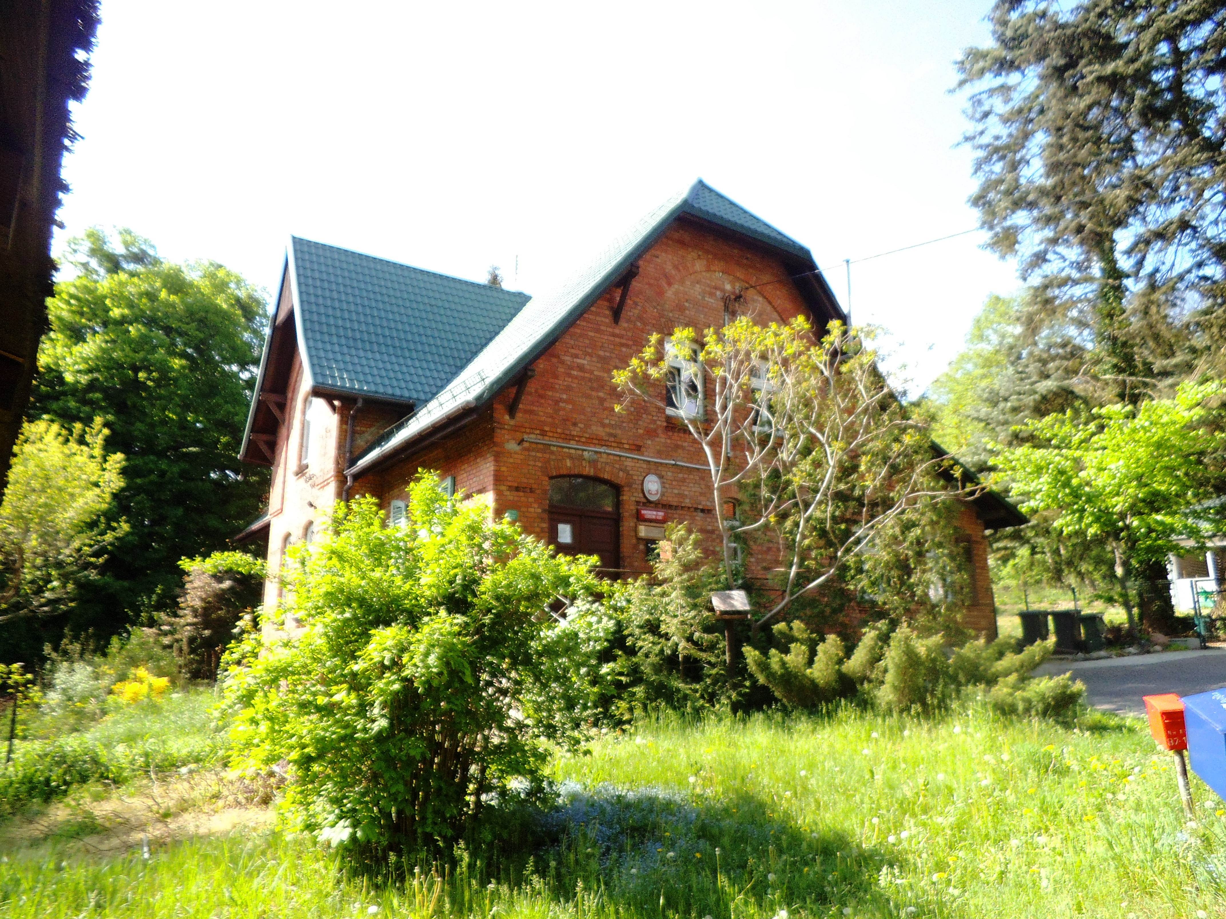 Leśnictwo Olek